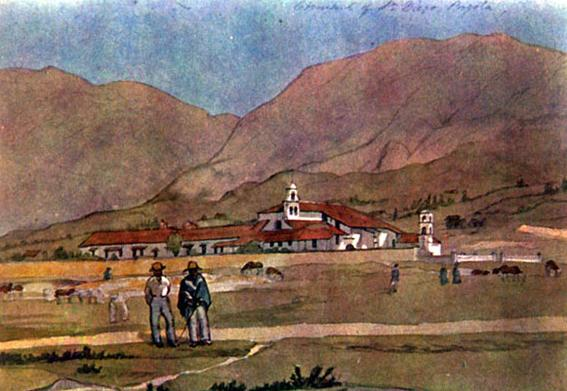 Iglesia y Recoleta de San Diego. Bogotá (Colombia). Edward Mark Walhouse. 1850